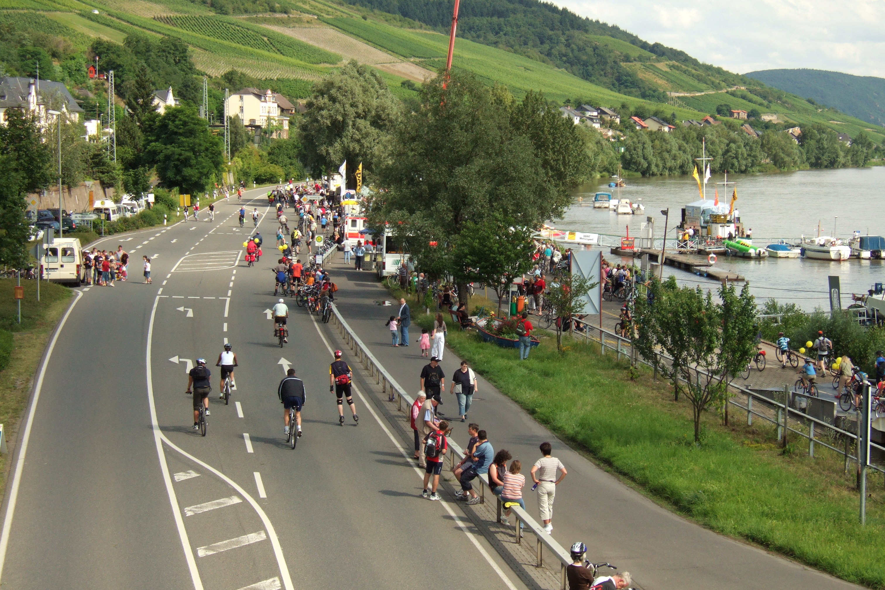 Tal Total 2007